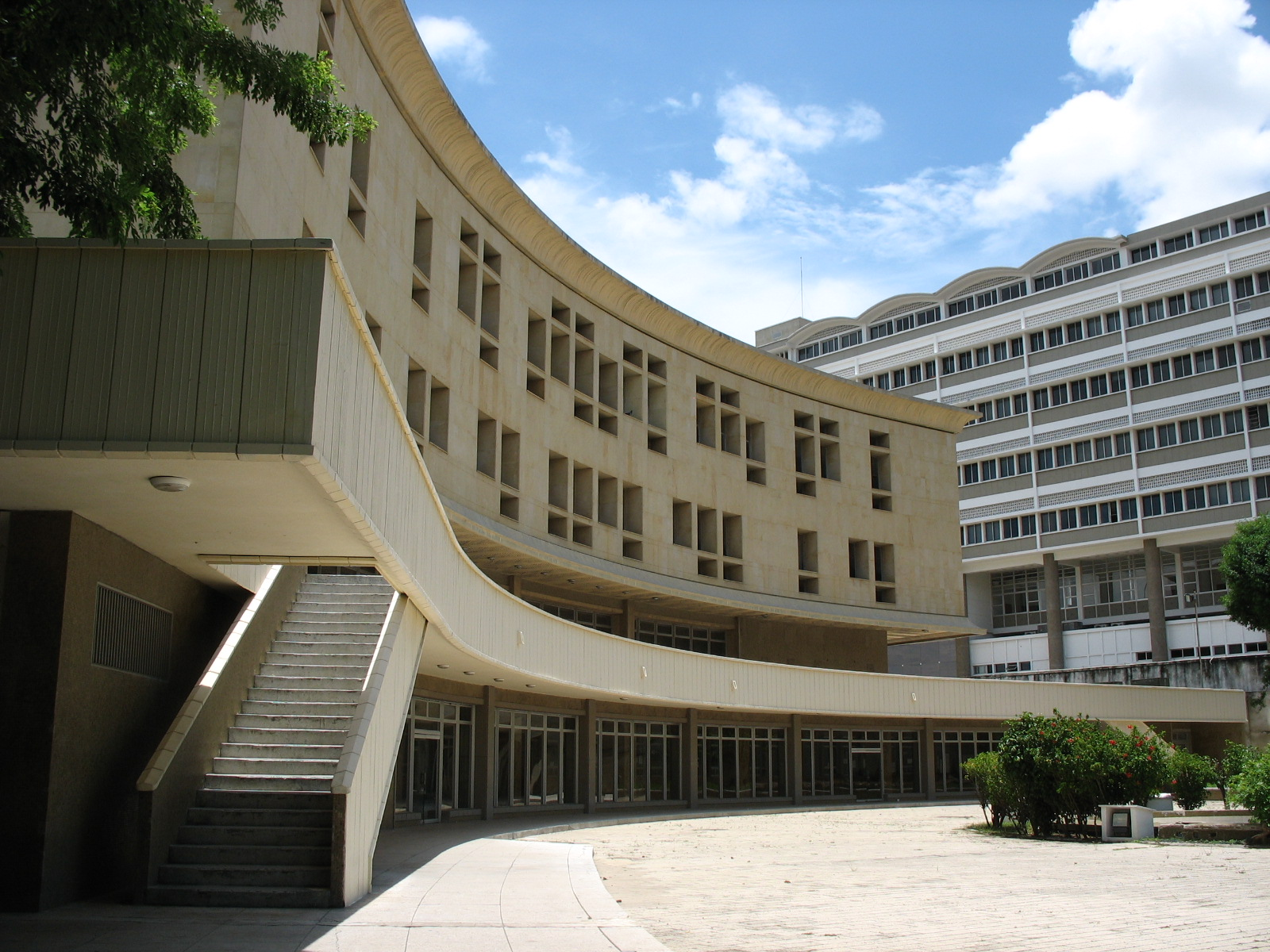 Centro Cívico de Barranquilla